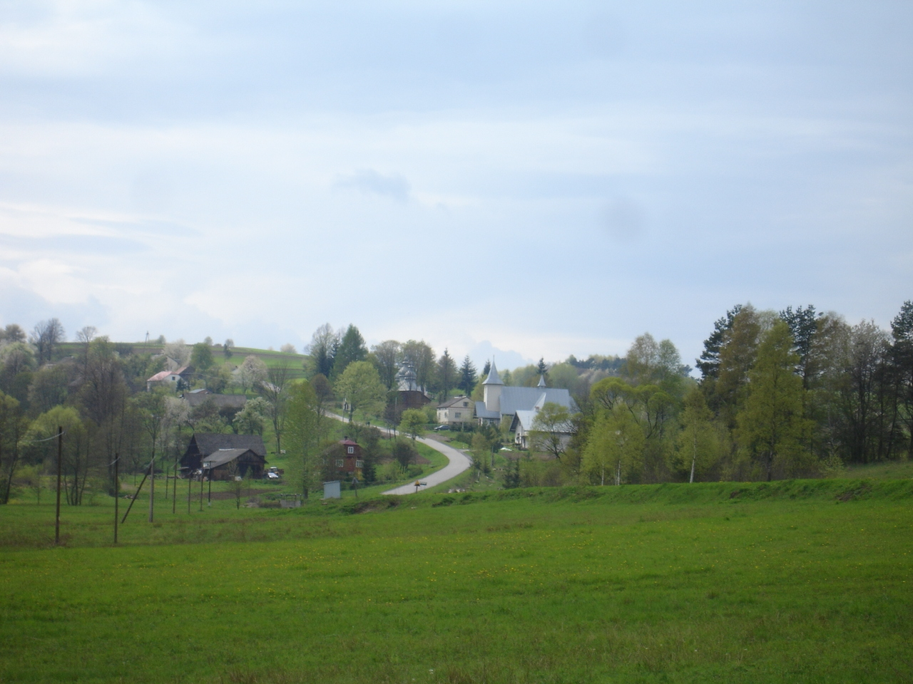 Jawornik R. view